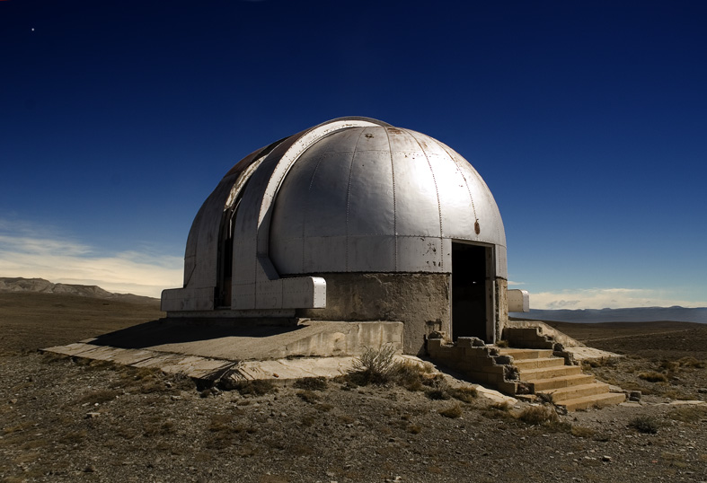 Observatorio Astronómico en las cercanías de El Calafate, Santa Cruz, Argentina